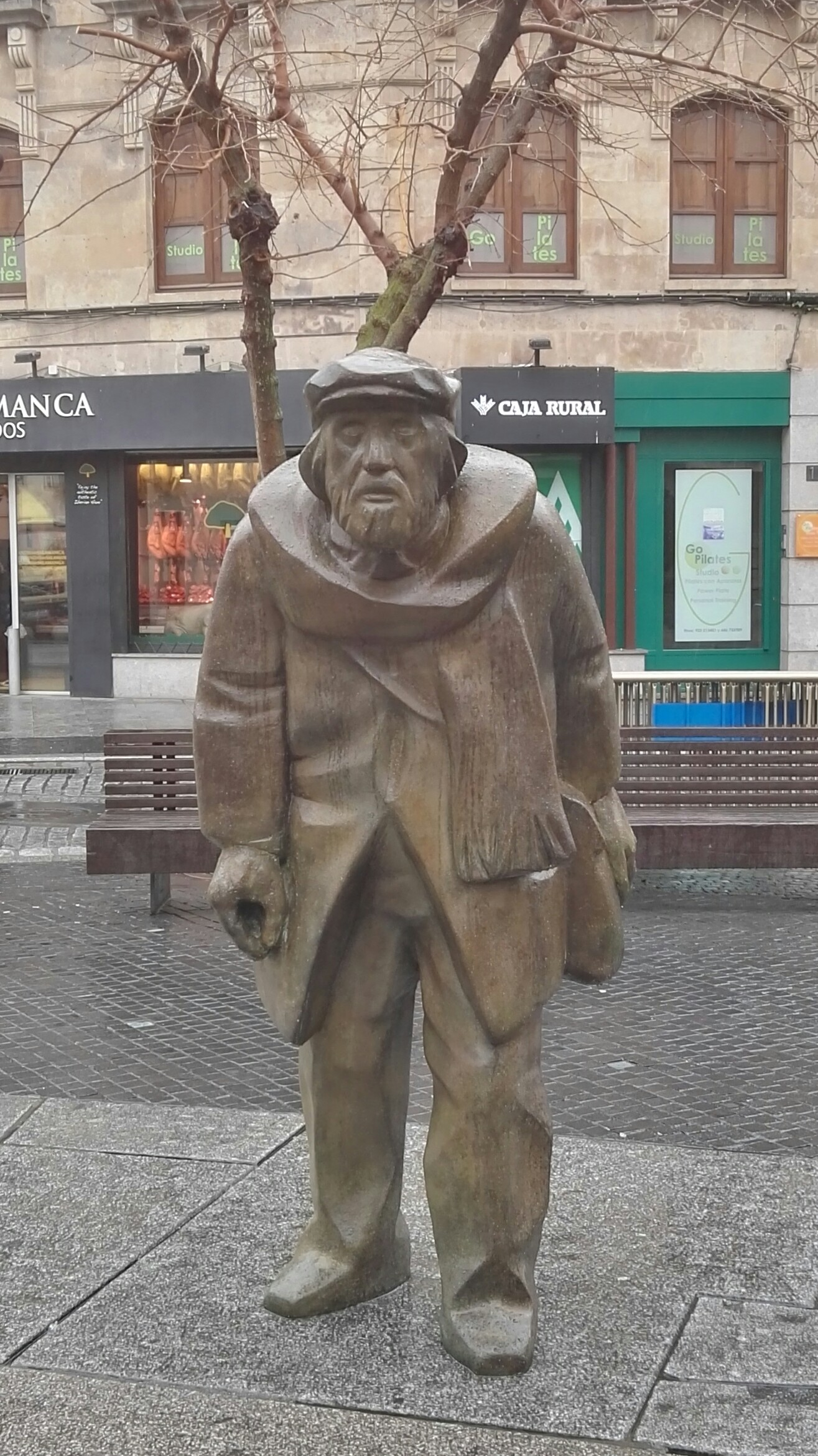 Monumento al poeta Remigio González Martín, obra de Agustín Casillas, situado en la plaza del Corrillo, Salamanca (España).